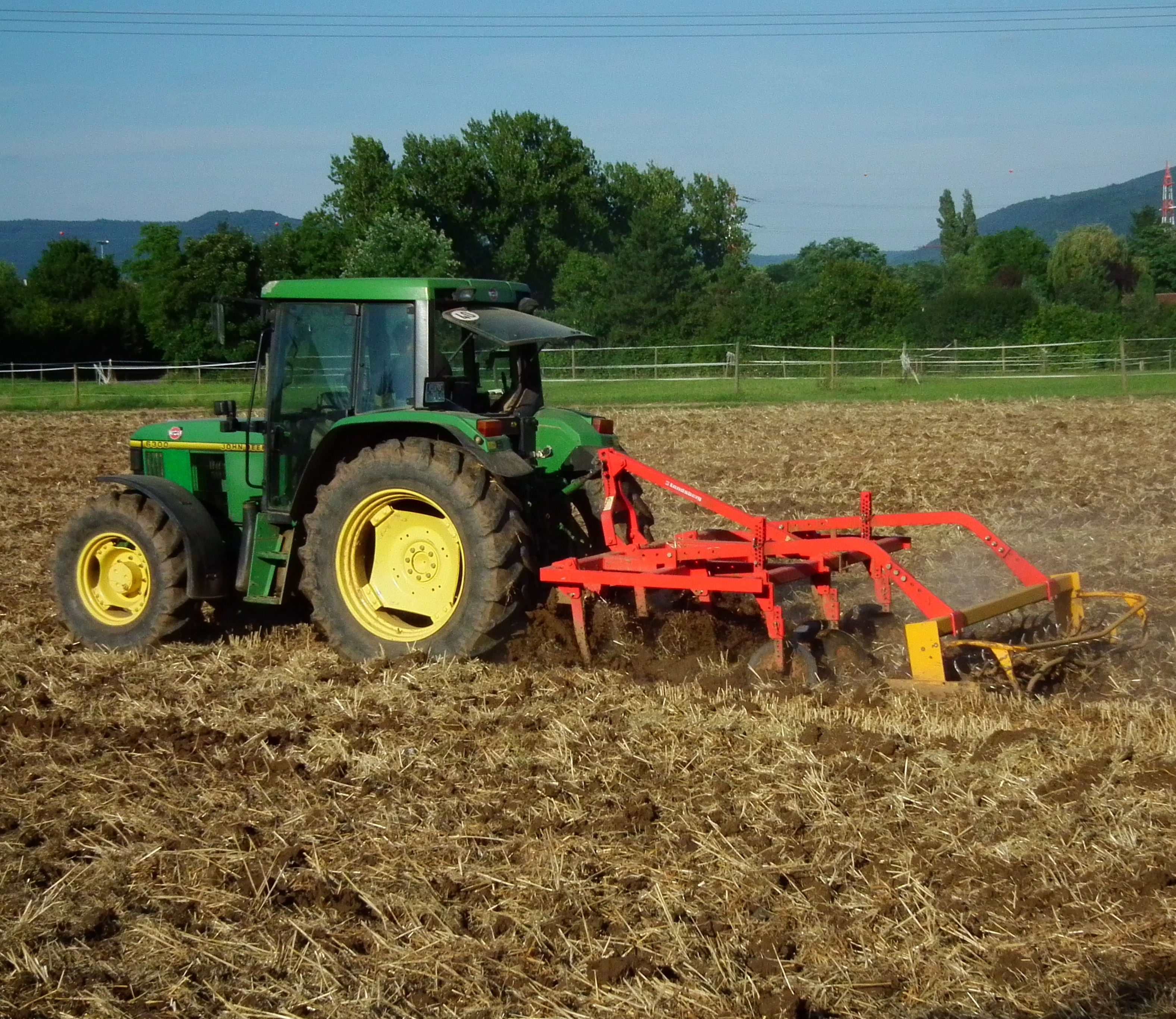 Traktor 6300 von John Deere und Synkro-Flügelschargrubber der Firma Landsberg (heute Pöttinger) beim Einsatz auf einem Feld im nördlichen Baden-Württemberg (Deutschland)